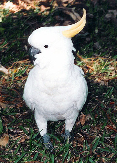 De Grote Geelkuifkaketoe in Australië.